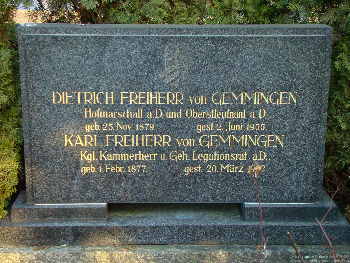 Grabmal für Dietrich Freiherr von Gemmingen (1879-1955) und Karl Freiherr von Gemmingen (1877-1962) auf dem Friedhof in Bad Rappenau-Fürfeld.